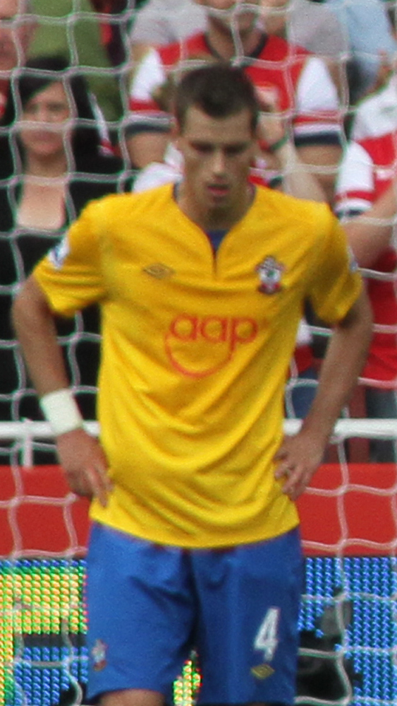 Morgan Schneiderlin v Arsenal.